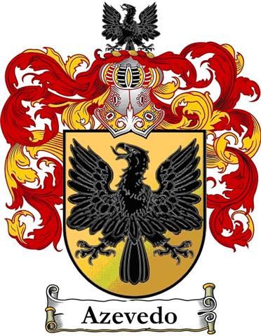 Brasão de armas da família Azevedo